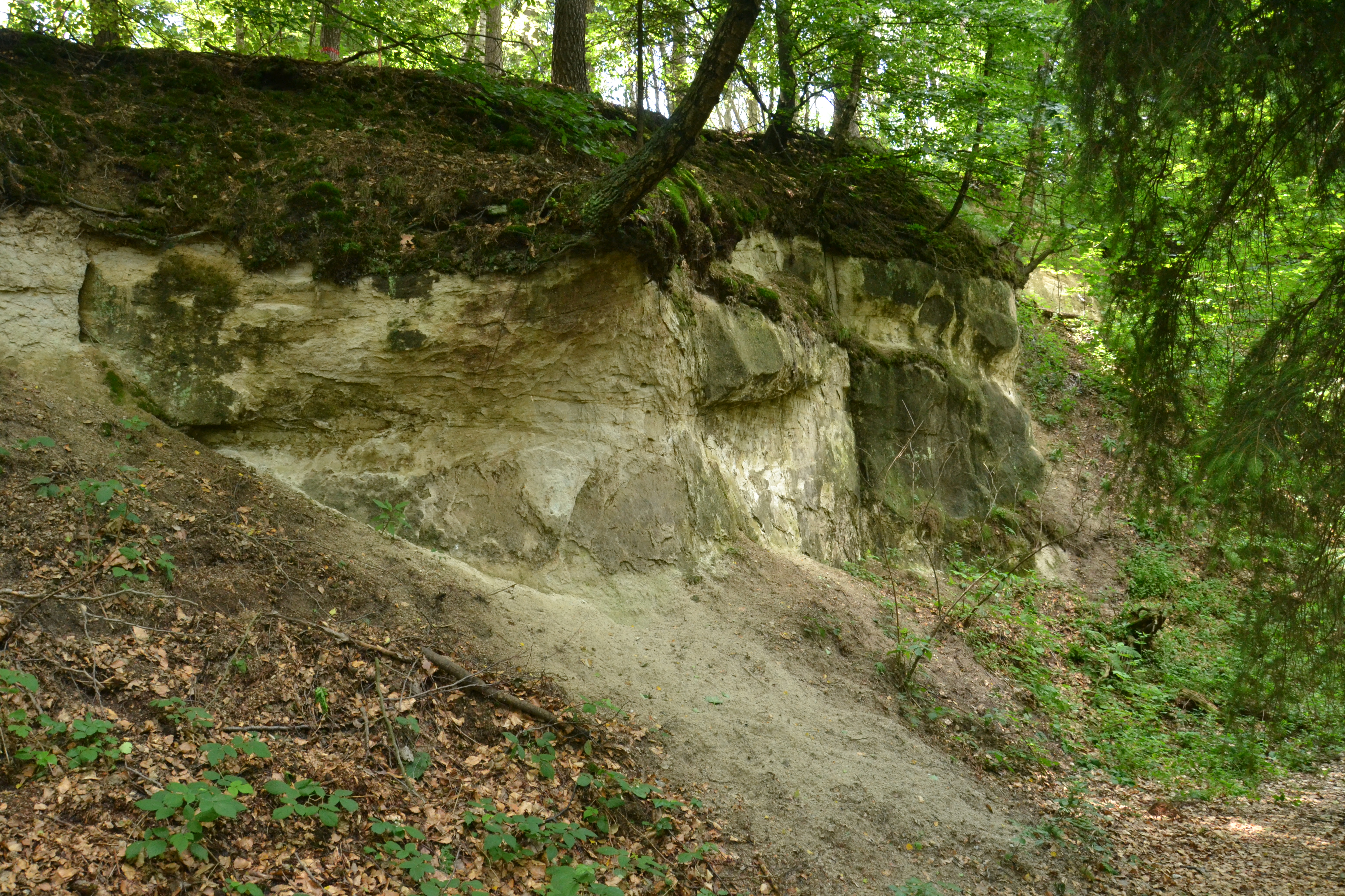 Stěna bývalého lomu